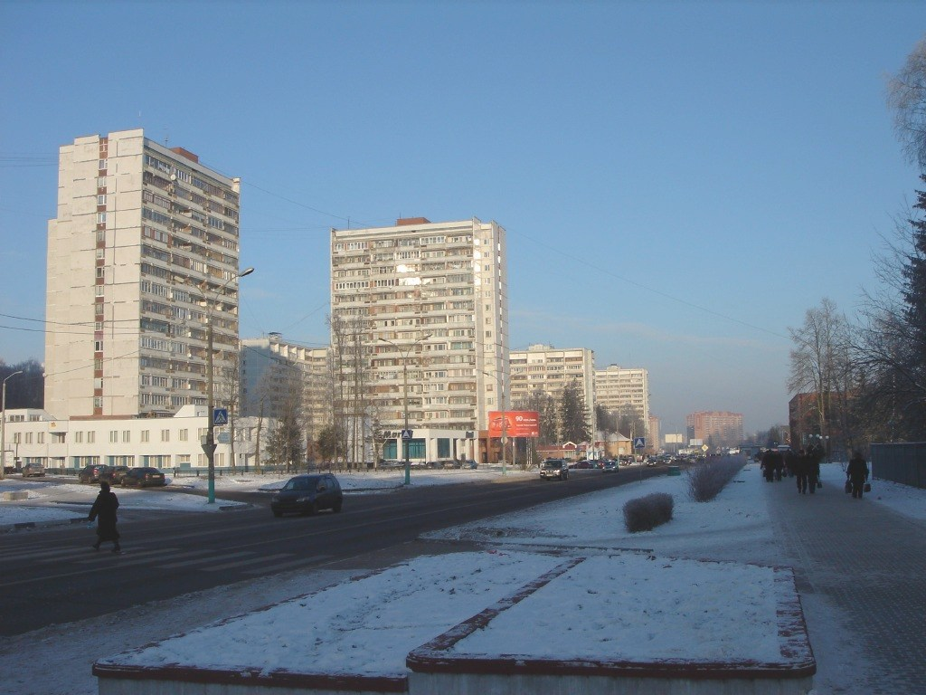 Oktyabrski prospect in winter Troitsk (Moscow region, Russia). Октябрьский проспект зимой.